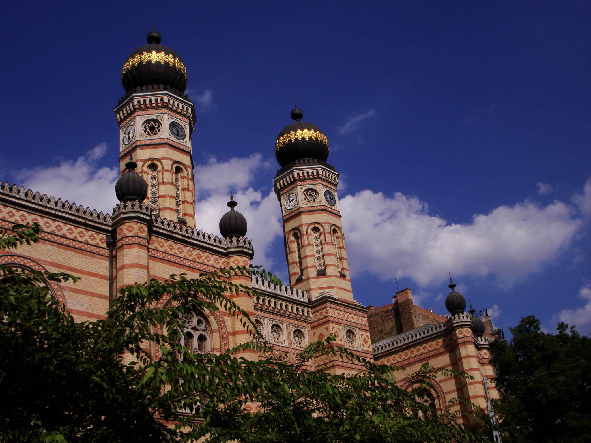 Questa foto rappresenta la Sinagoga a Budapest, è stata scattata da me, G. Salluzzi ad agosto 2007 ed è rilasciata in Pubblico Dominio